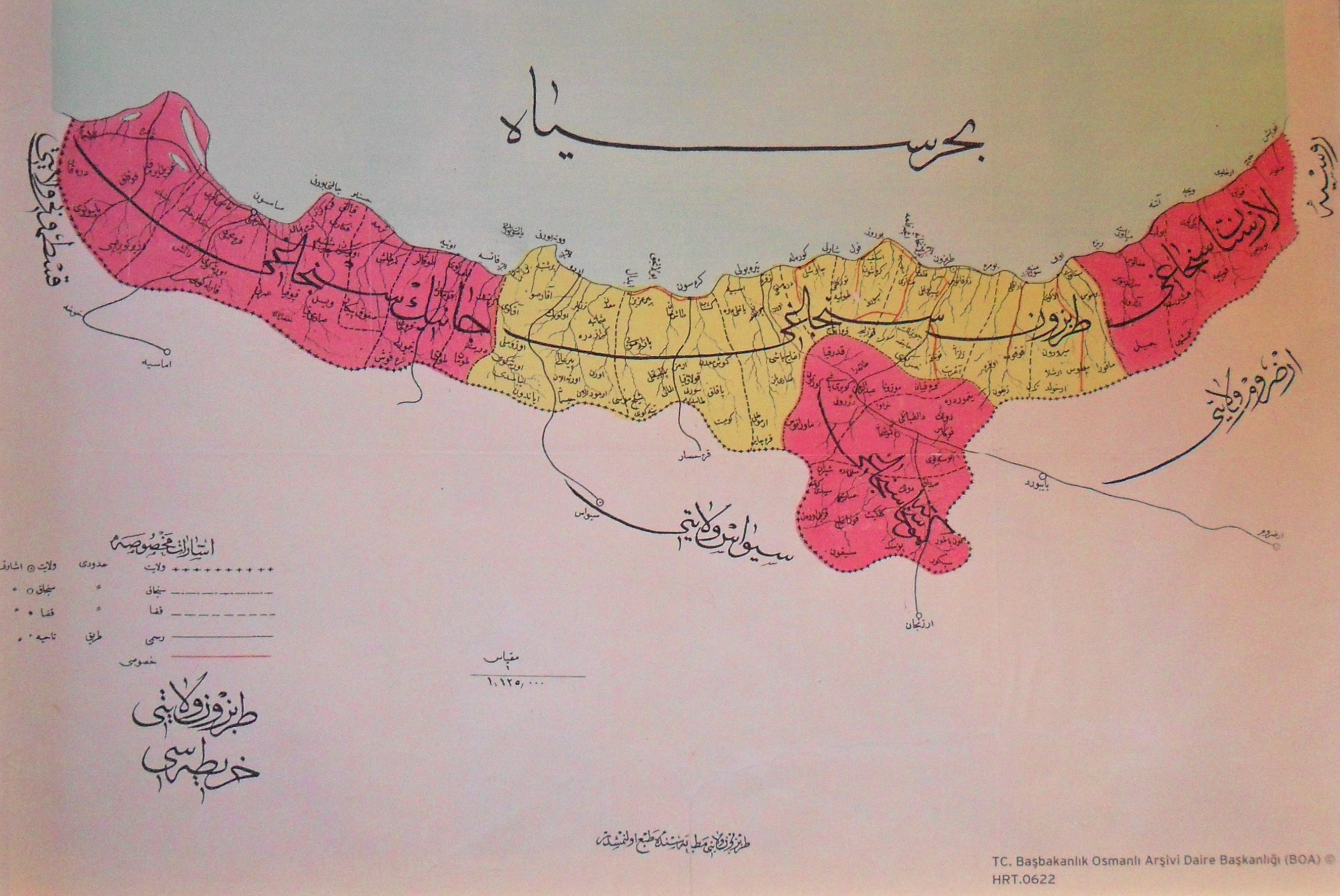 Samsun Kent Müzesi'nde sergilenen Trabzon Vilayeti haritası.